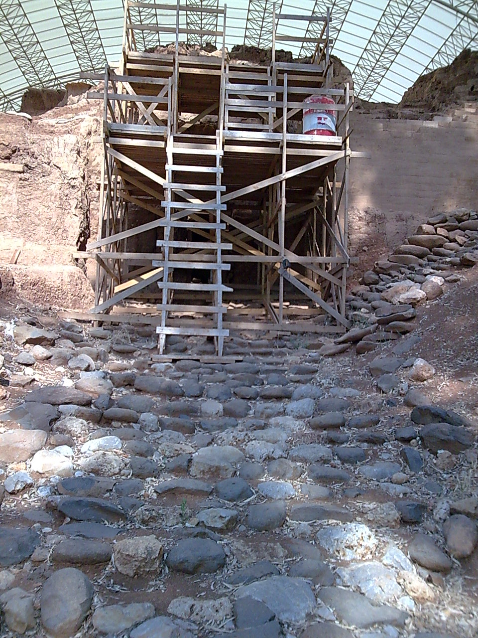 Tel Dan-Canaanite Gate